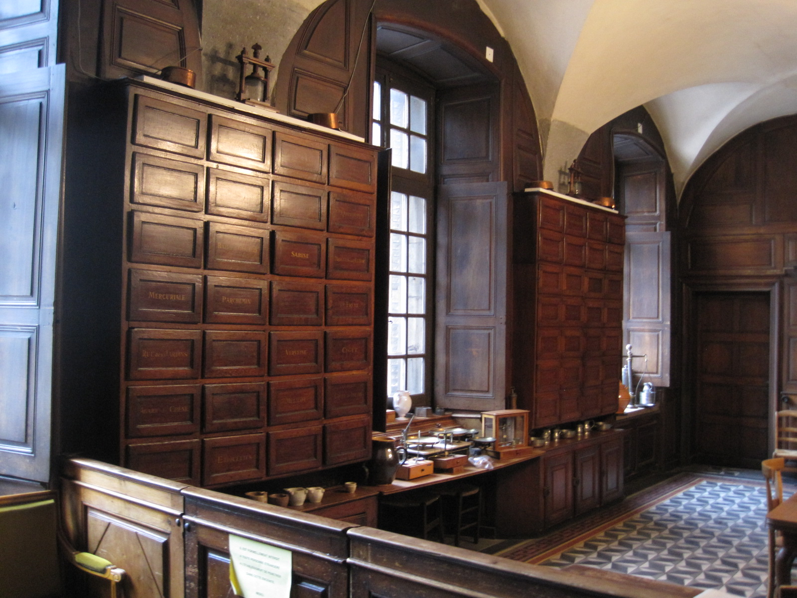 Apothicairerie de Besançon